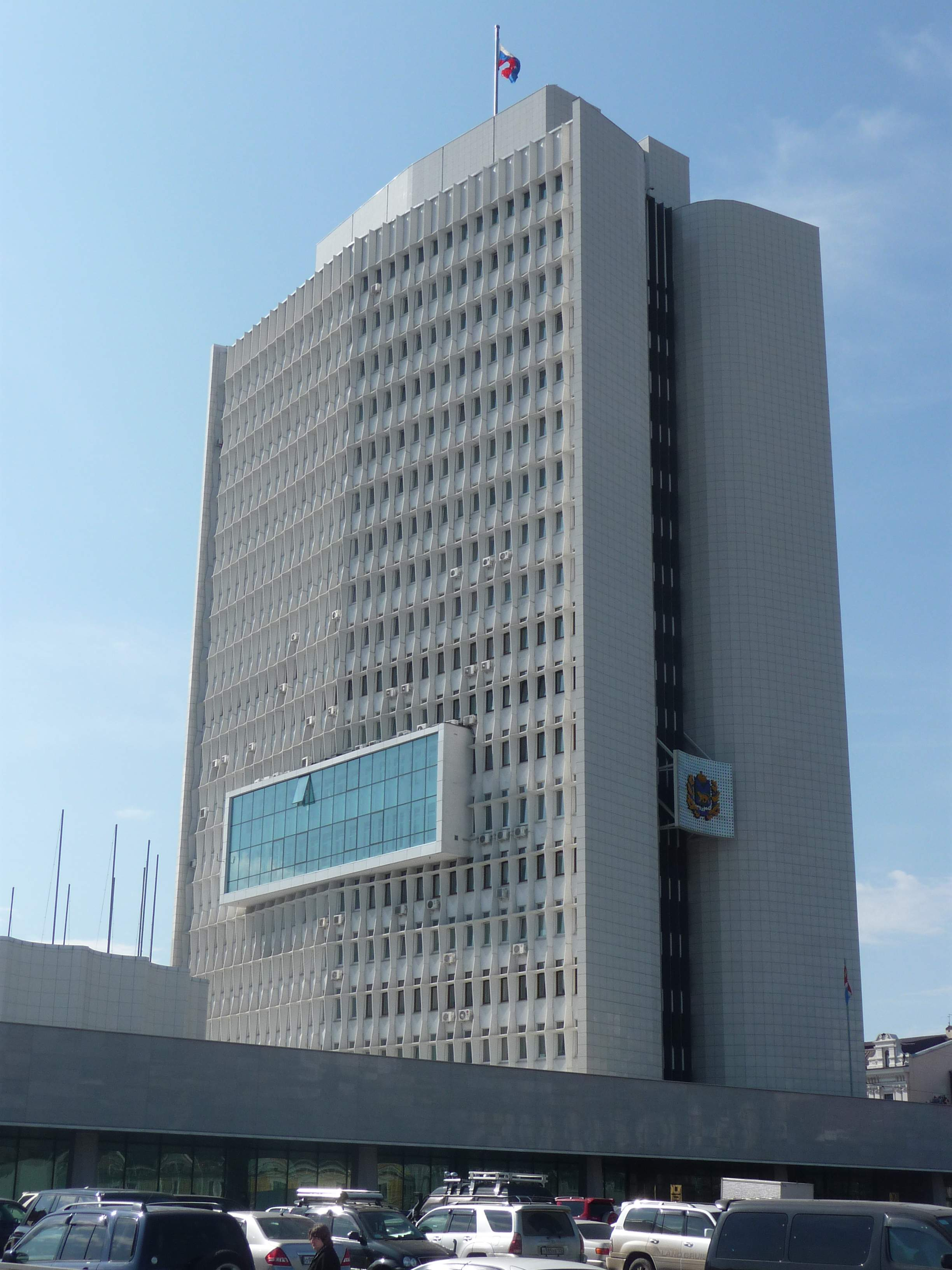 Здание приморской краевой администрации («Белый_дом»), Владивосток, Светланская, 22, 2011-06-14.JPG